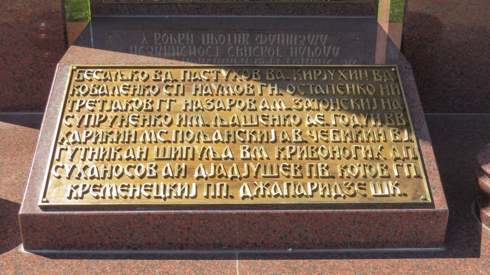 Српски (ћирилица): Списак изгинулих црвеноармејаца у "Нишком инциденту" 7. новембра 1944. године